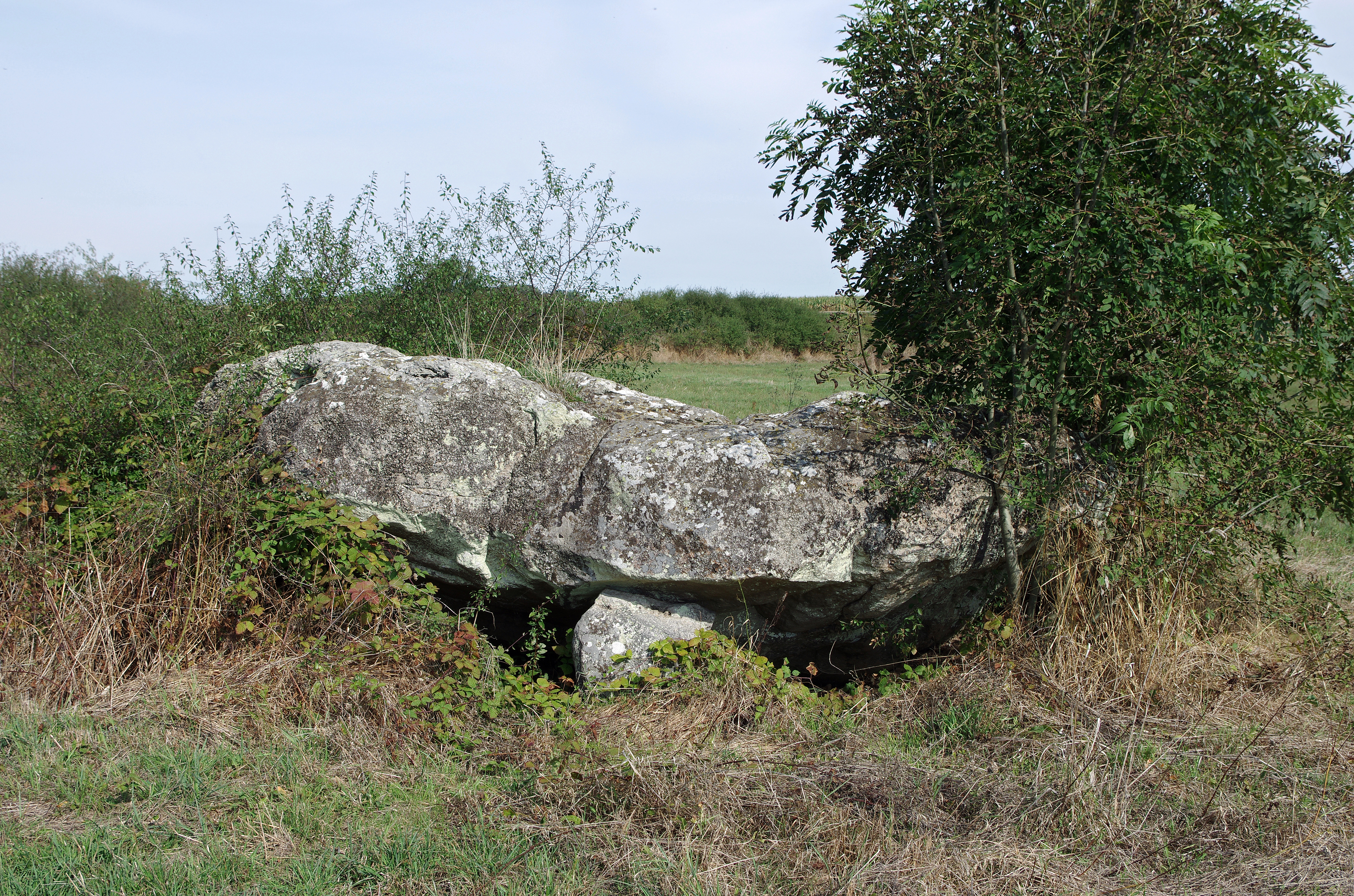 derrière la ferme de la Basse-Cour, on voit un dolmen incliné dit Palet de Gargantua, Alluyes, Eure-et-Loir, France.